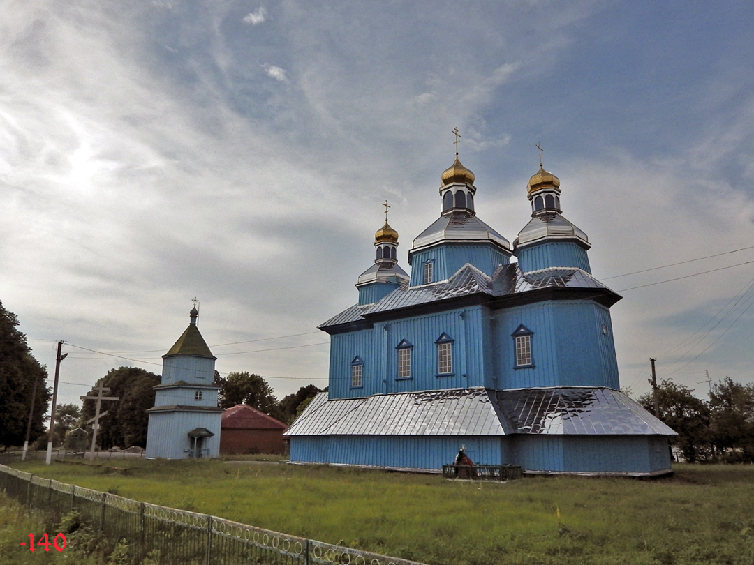 Воздвиженська церква і дзвіниця, с. Барвинівка